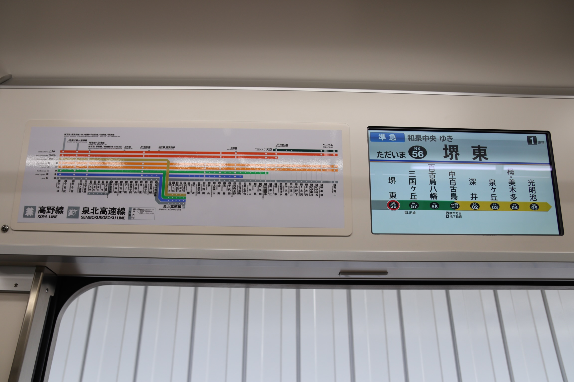 南海8300系(高野線) LCDディスプレイ、路線図